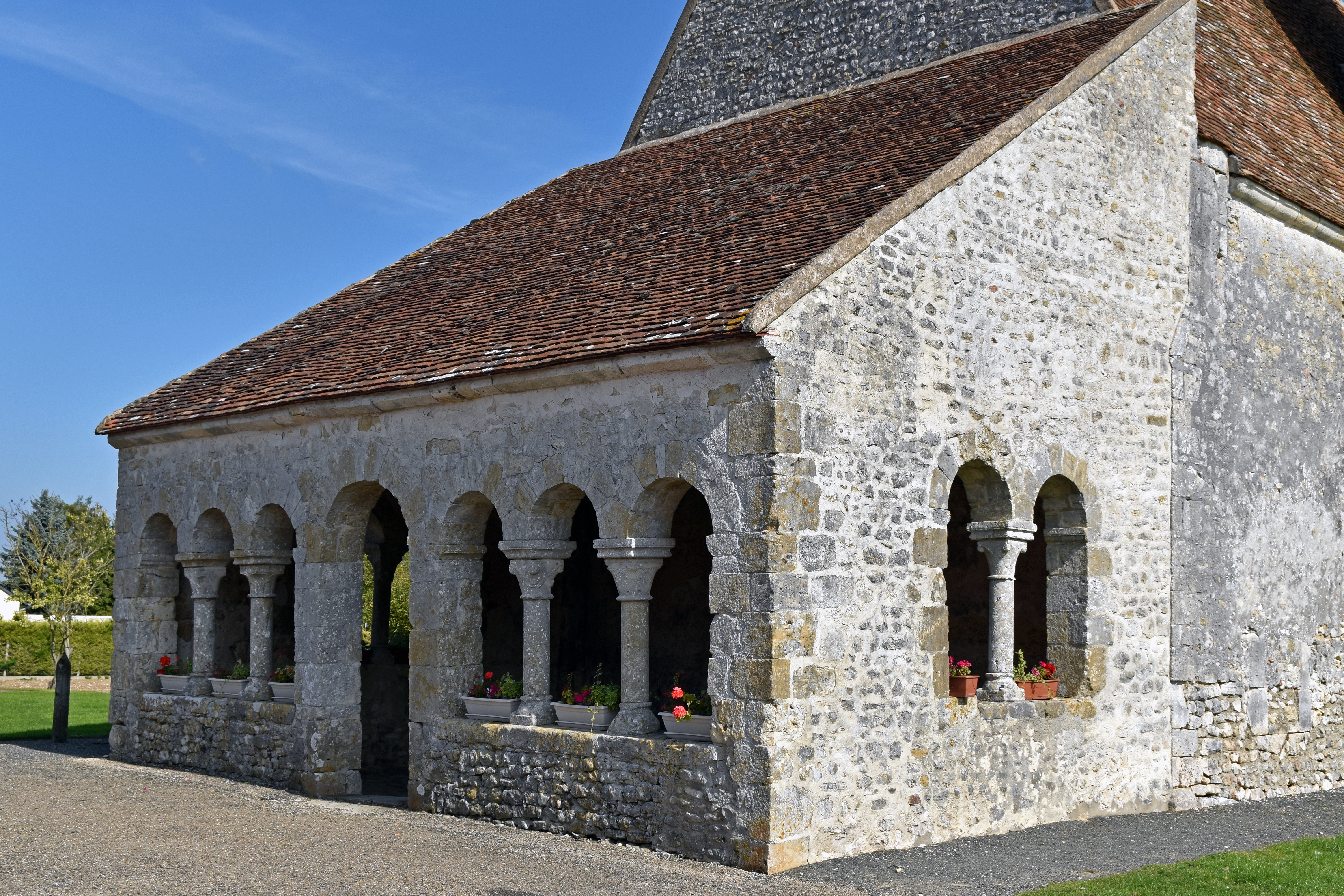 Église Saint-Étienne à Mondreville, Seine et Marne, France